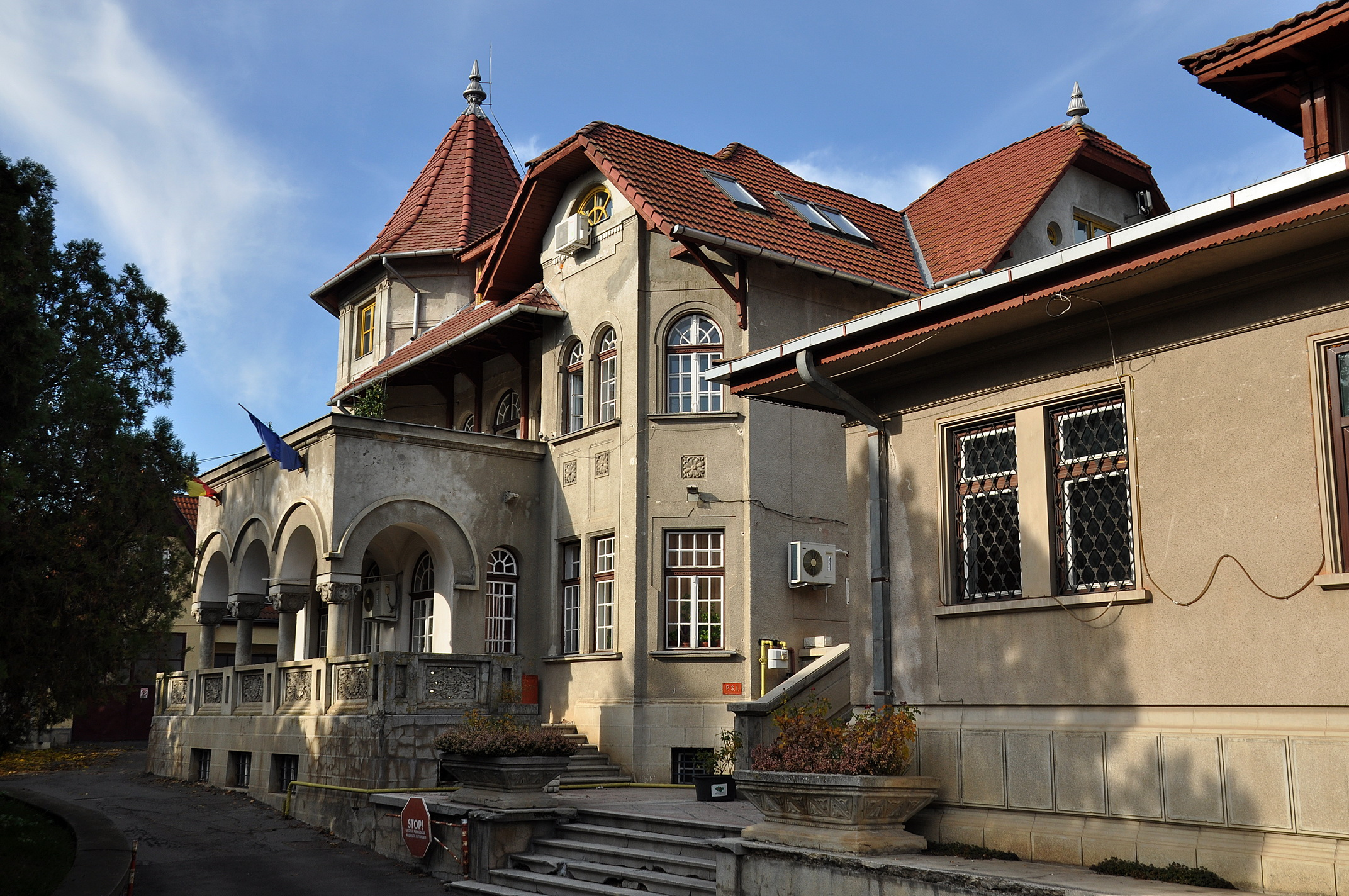 A Marosvásárhelyi Rádió épülete Fotó: Nemes Attila